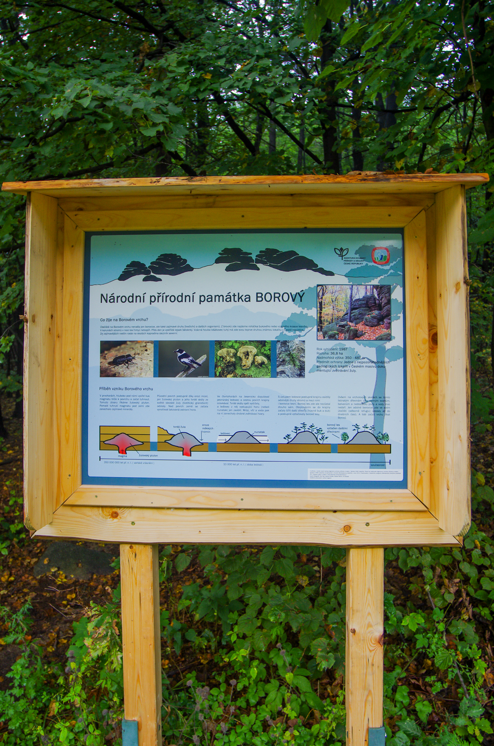 Národní přírodní památka Borový, na Borovém vrchu u Žulové, okres Jeseník